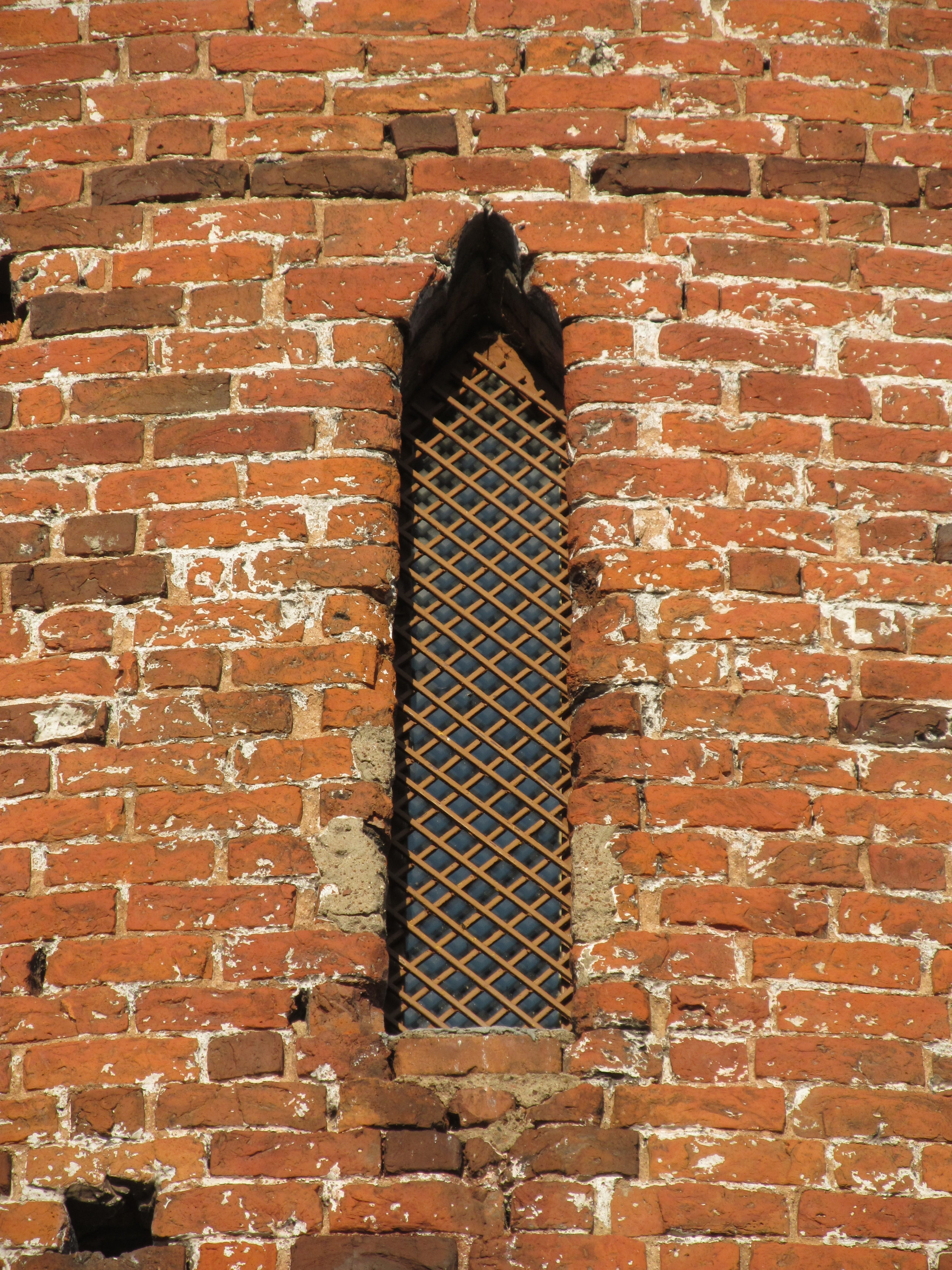 Байніца